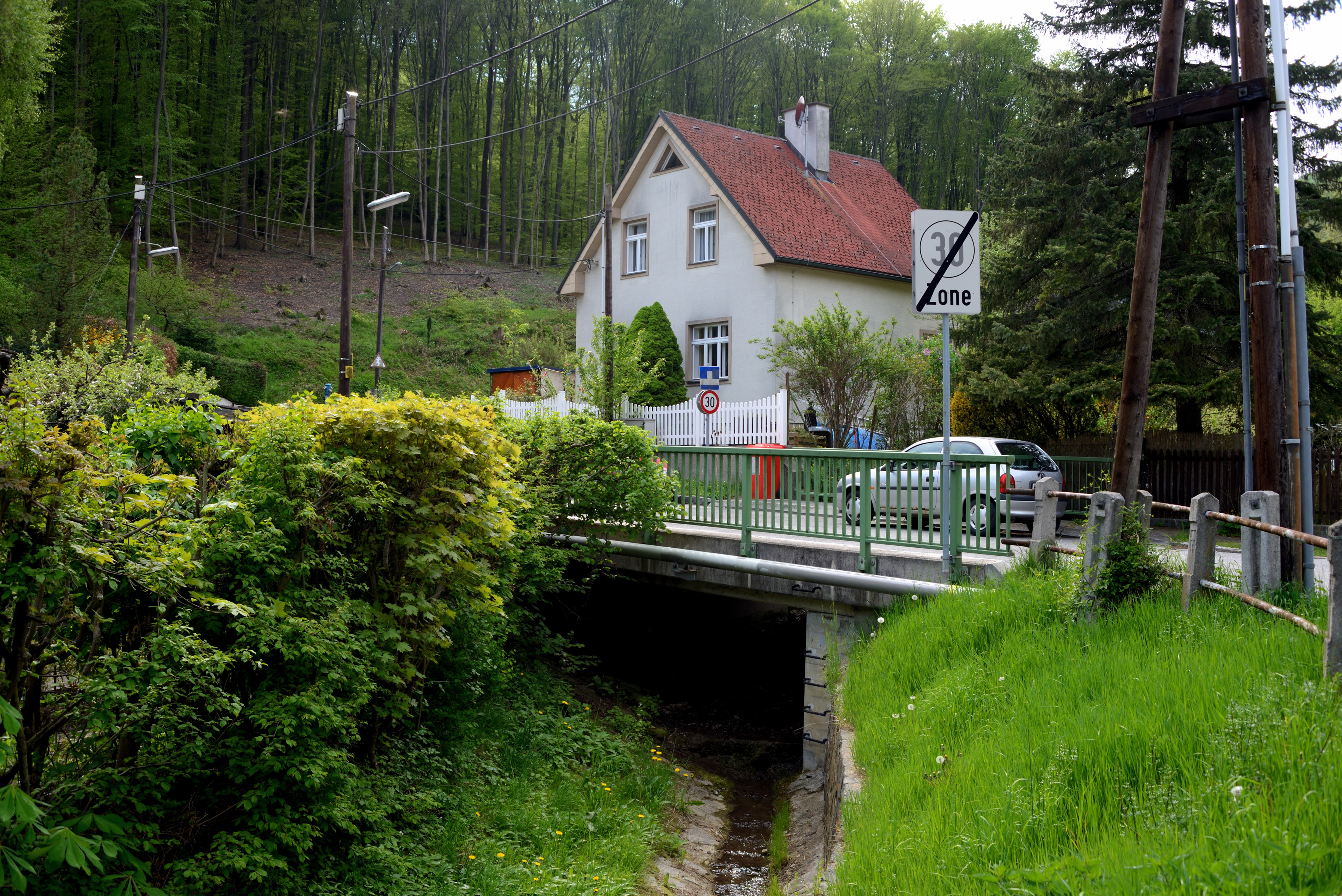 Schuhmeierbrücke im Wurzbachtal